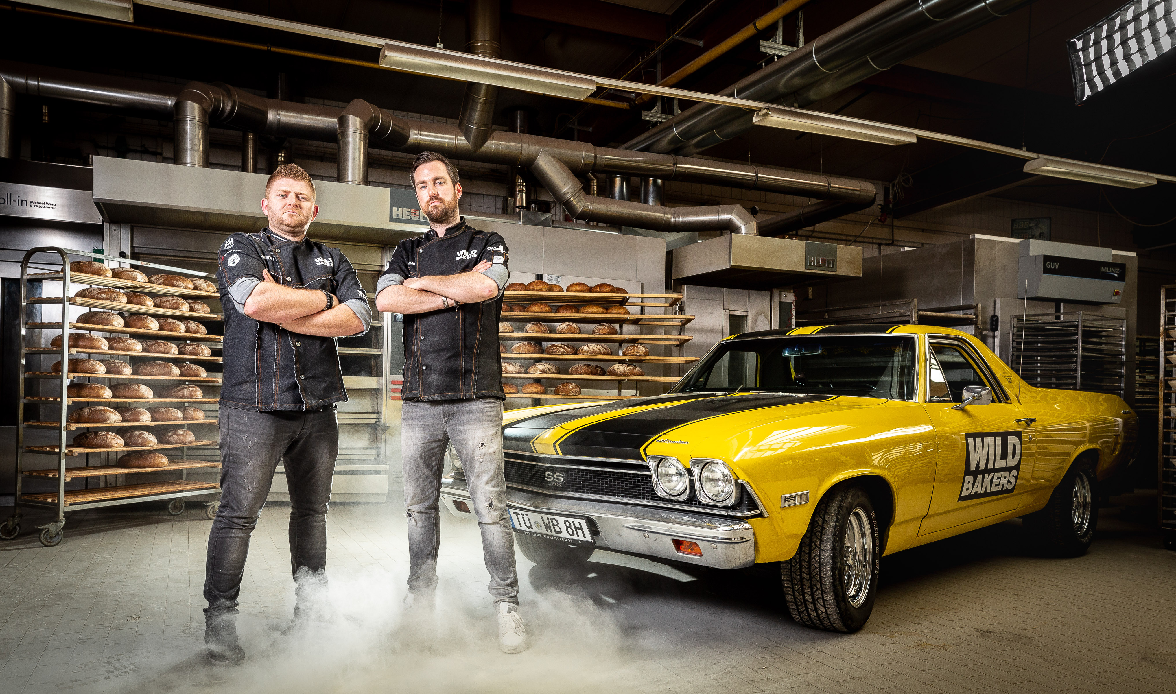 Die Wildbakers in der Gomaringer Backstube mit Ihrem TV-Auto